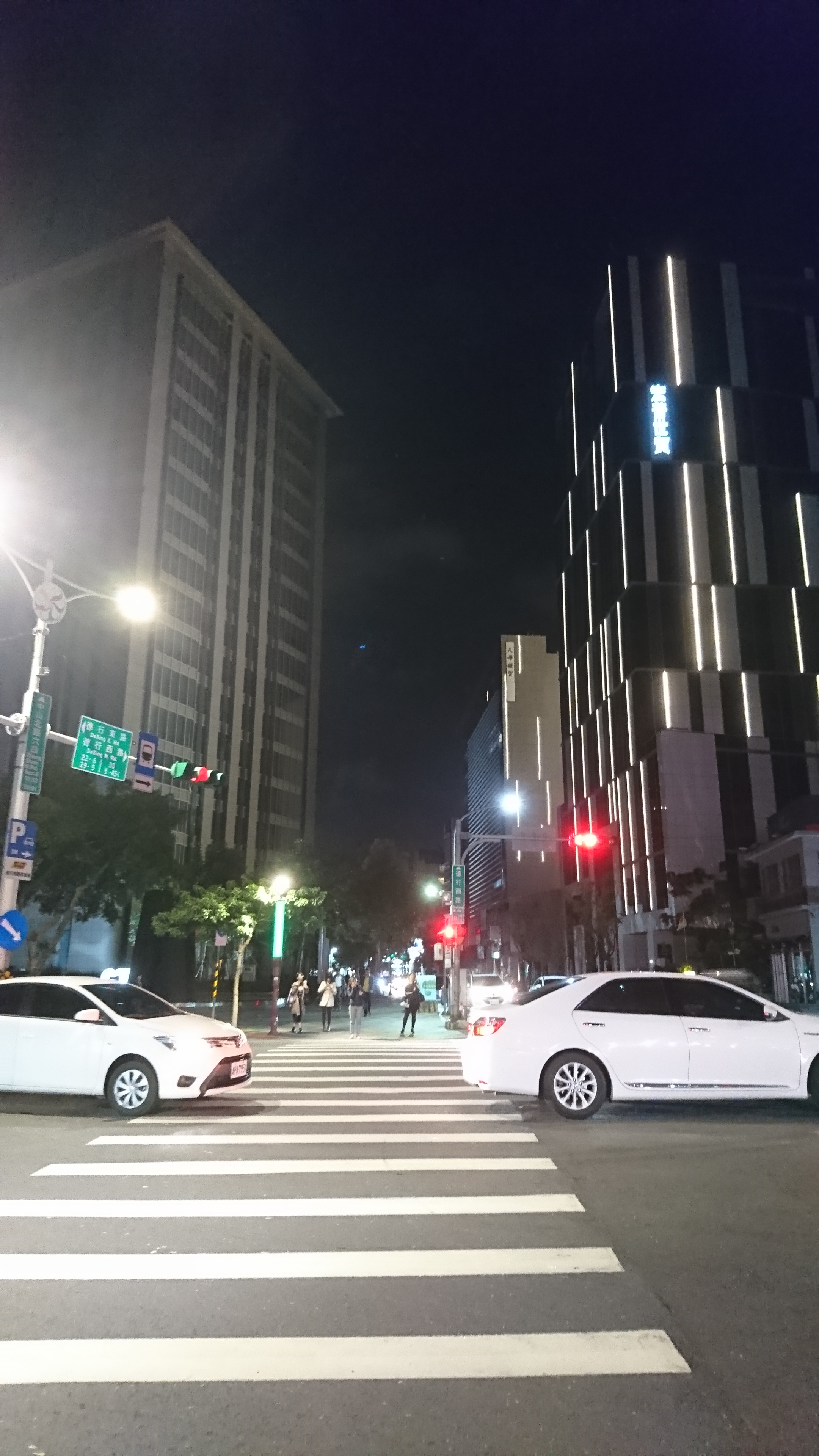 臺北市士林區德行東西路與中山北路六段口夜景。